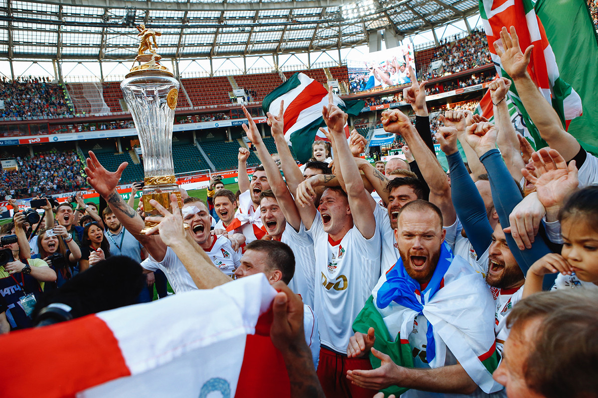 «Локомотив» - чемпион! Как это было